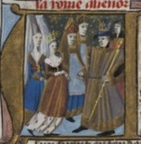 mariage de Louis VII et de Constance de Castille